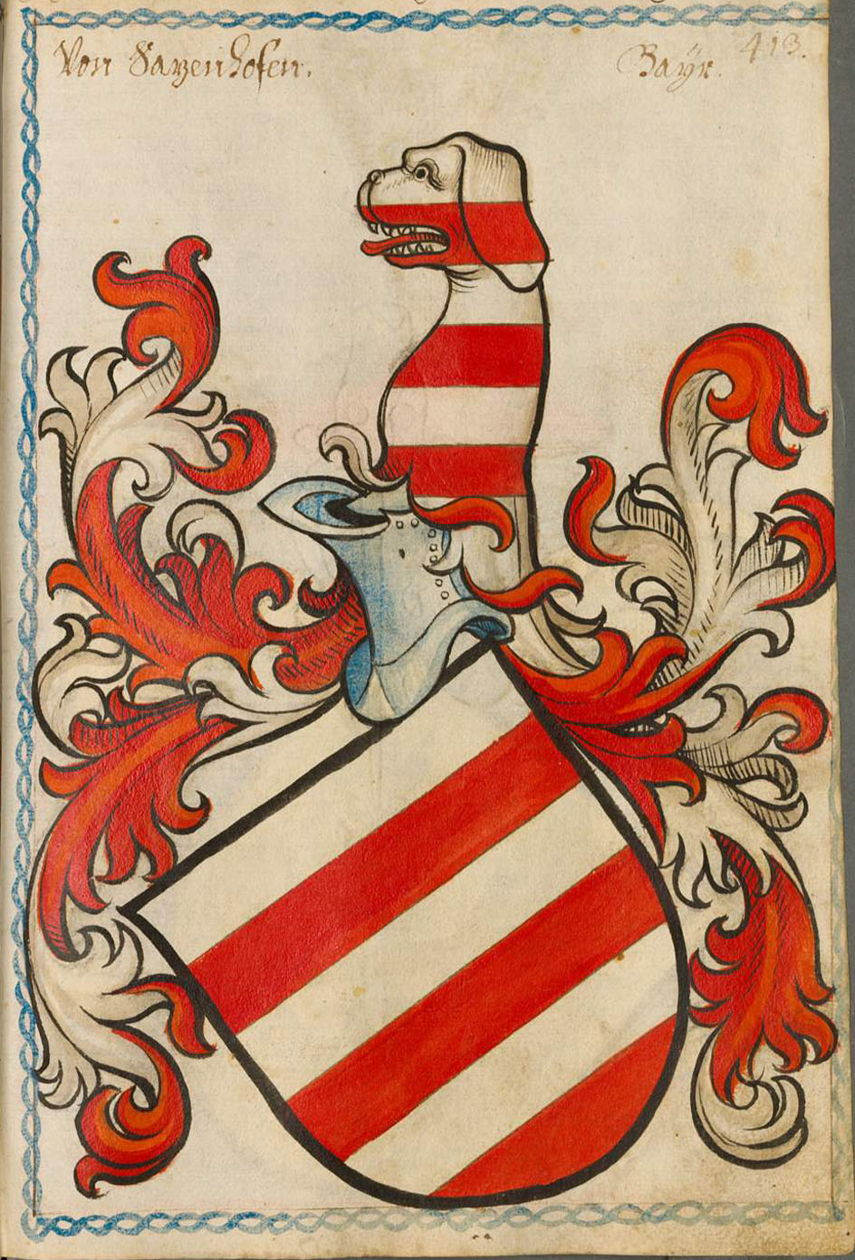 Scheibler'sches Wappenbuch , älterer Teil Bayern Sazenhofen